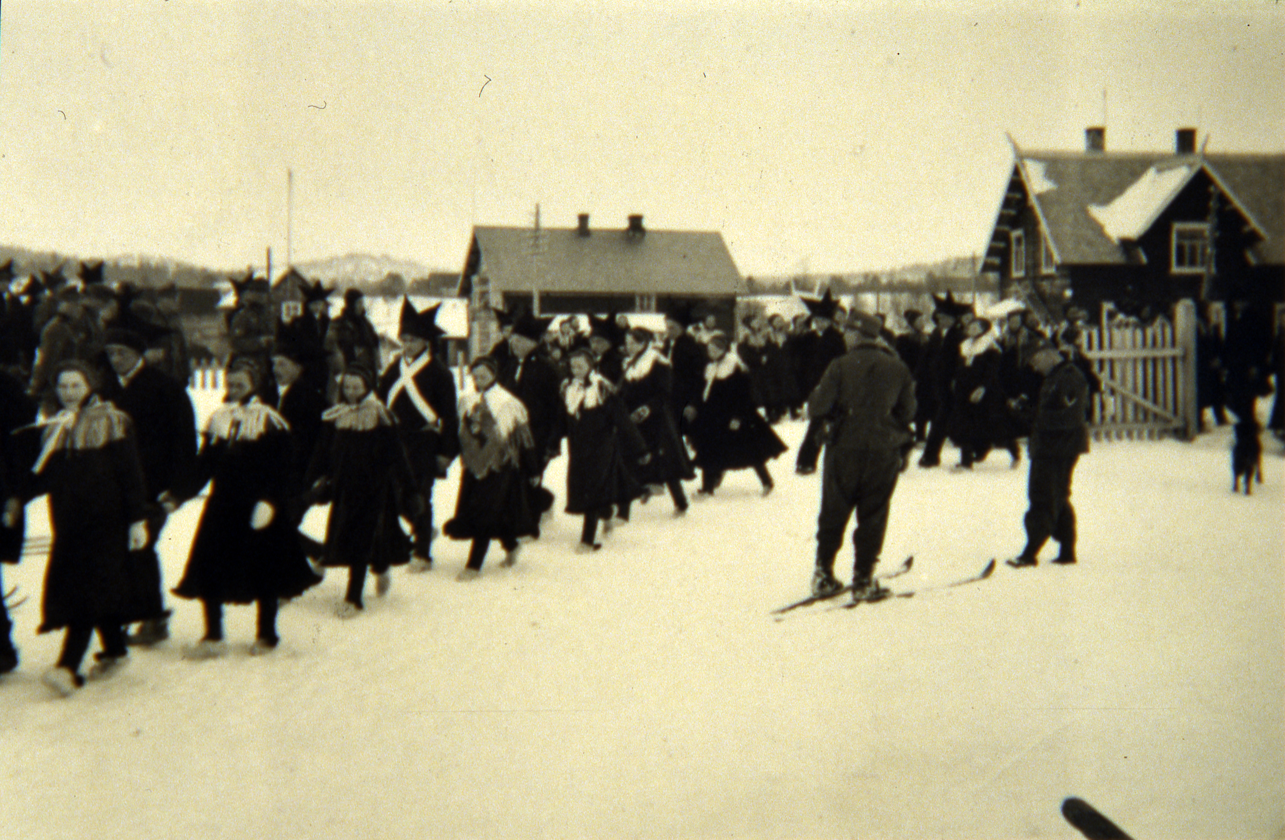 Samebryllup i Karasjok, 1940 Tittel / Title: Samebryllup i Karasjok Dato / Date: November 1940 Fotograf / Photographer: Ukjent/Unknown Utgiver / Publisher: Sted / Place: Karasjok Eier / Owner Institution: Arkiv i Nordland Lenke / Link: Arkiv i Nordland Arkivreferanse /Archive reference: AIN.NA143.0395 Fra Dag Skogheims Privatarkiv Tekst bak bildet: November 1940 i Karasjok: Eine lappenhochzeit, der brautigam tragteine gekreuzte weisse schleife über dem gewand, gebirgsjäger bewundern den malerischen festzug! November 1940 i Karasjok: Et samebryllup, brudgommen bærer en hvit sløyfe på kryssende hvit kappe på plagget, en bergjeger beundrer det idylliske festspillet! November 1940 in Karasjok: A Sami's wedding, the groom wears a white ribbon on intersecting white robe of the garment, a Gebirgsjäger admiring the idyllic feast!